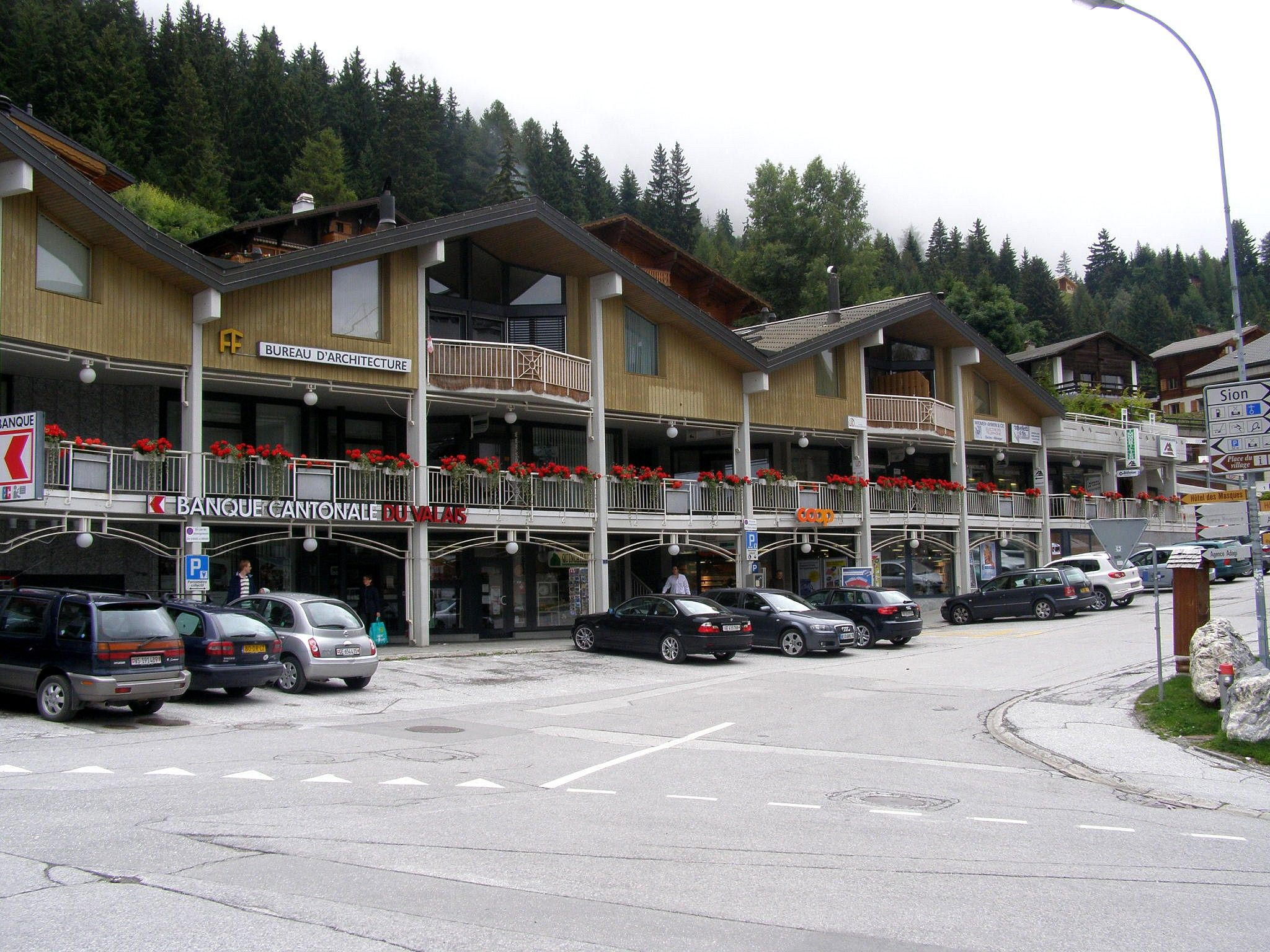 Nákupná pasáž na ulici Les Arcades